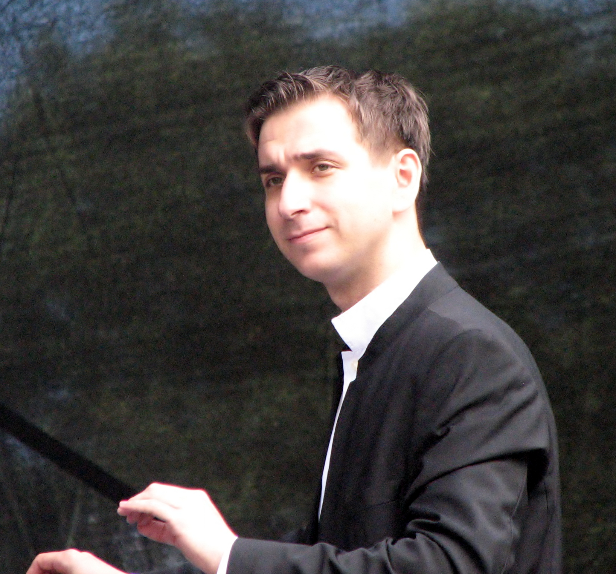 Mihhail Gerts esinemas Estonia teatri 107. hooaja avamisel